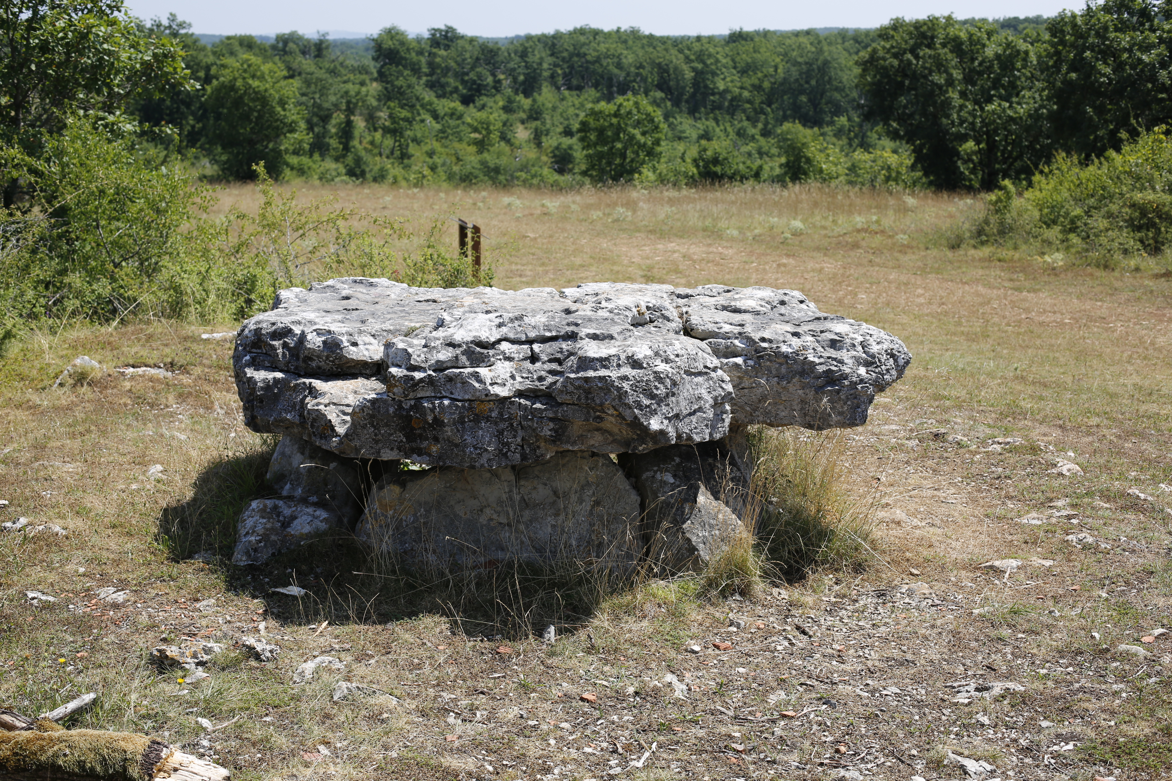 Dolmen de La Palein à Saint-Cernin-de-Larche.